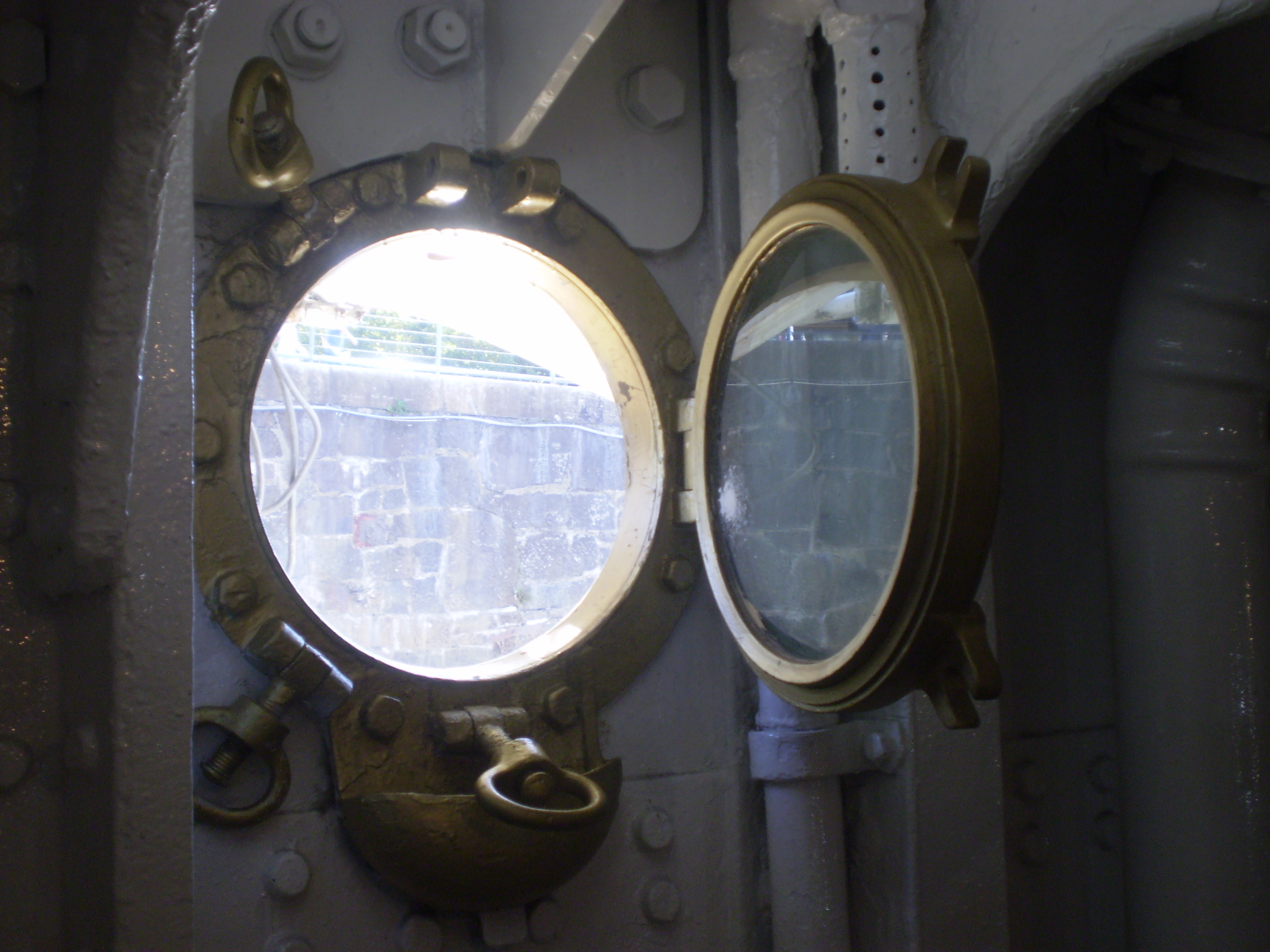 Buque Museo Fragata A.R.A. Presidente Sarmiento, amarrada en puerto Madero, Buenos Aires, Argentina